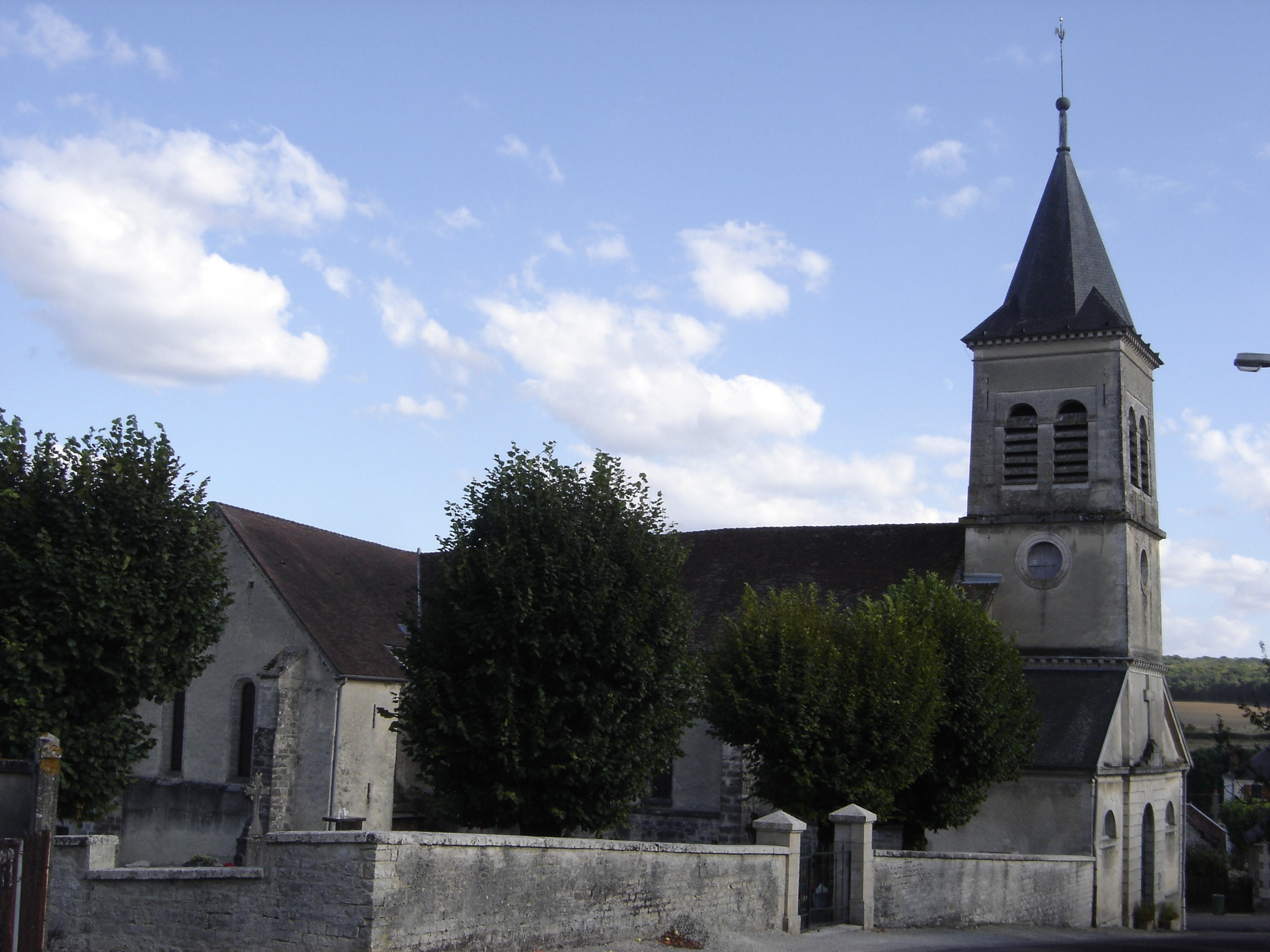 église de Vitry-le-Croisé - Aube - France